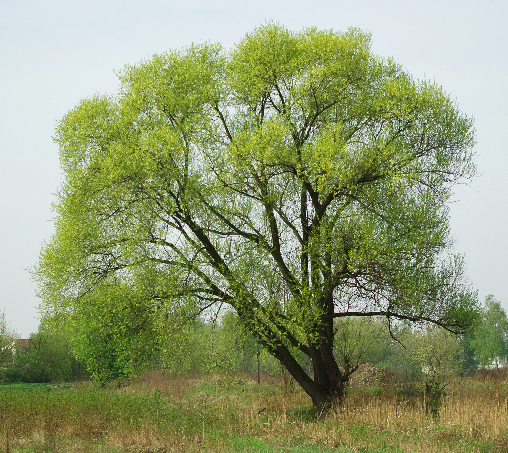 Wierzba krucha (Salix fragilis) - pokrój drzewa